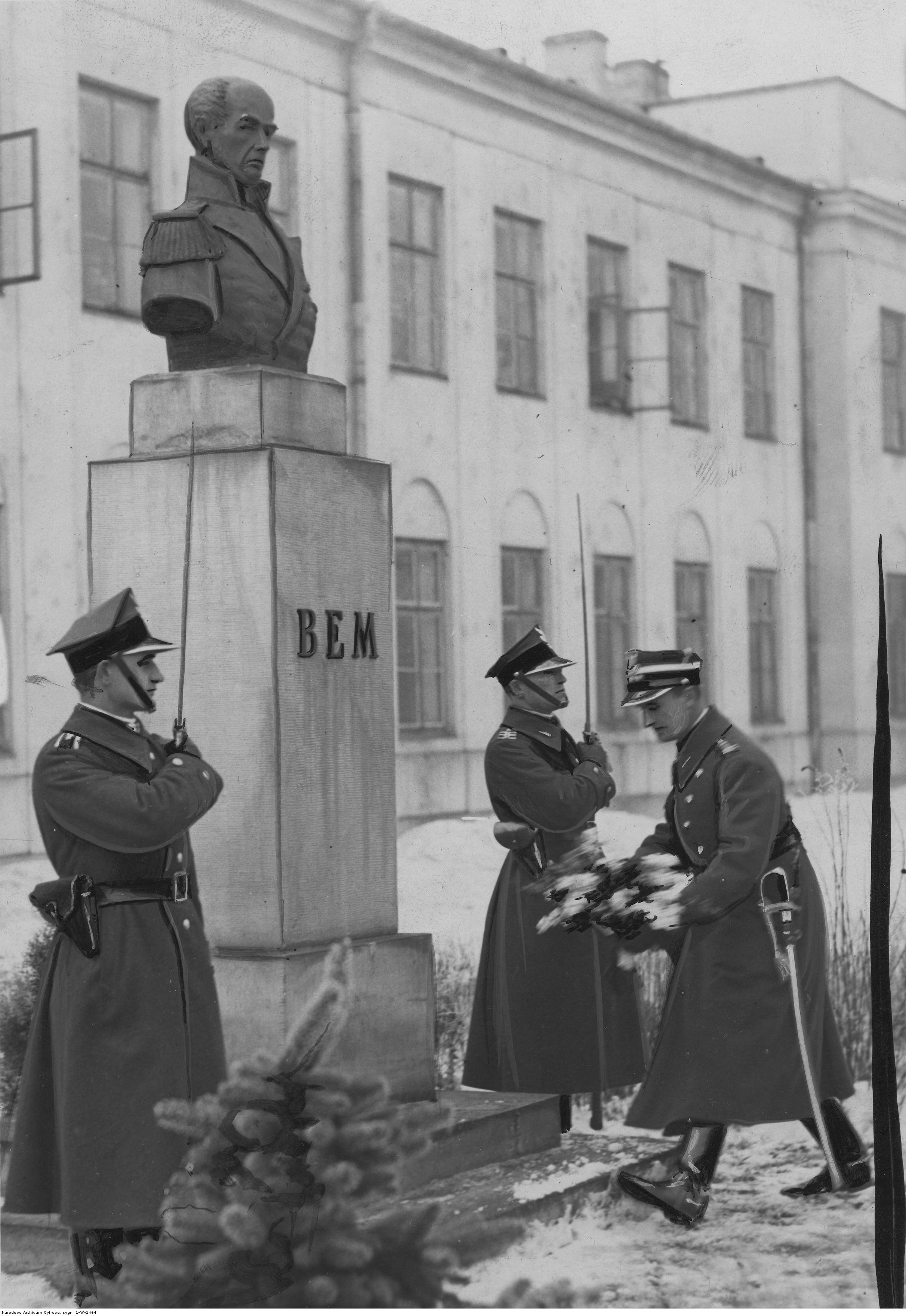 Święto 1 Dywizjonu Artylerii Konnej im. gen. Józefa Bema w Warszawie. Pułkownik Antoni Trzaska-Durski składa wieniec pod pomnikiem gen. Józefa Bema. Koncern Ilustrowany Kurier Codzienny - Archiwum Ilustracji. Sygnatura: 1-W-1464